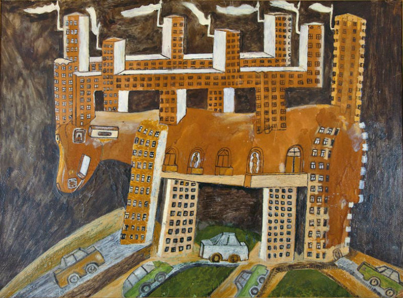 Sekulić Sava, Jelengrad,1948.ulje-karton,74 x 97 cm